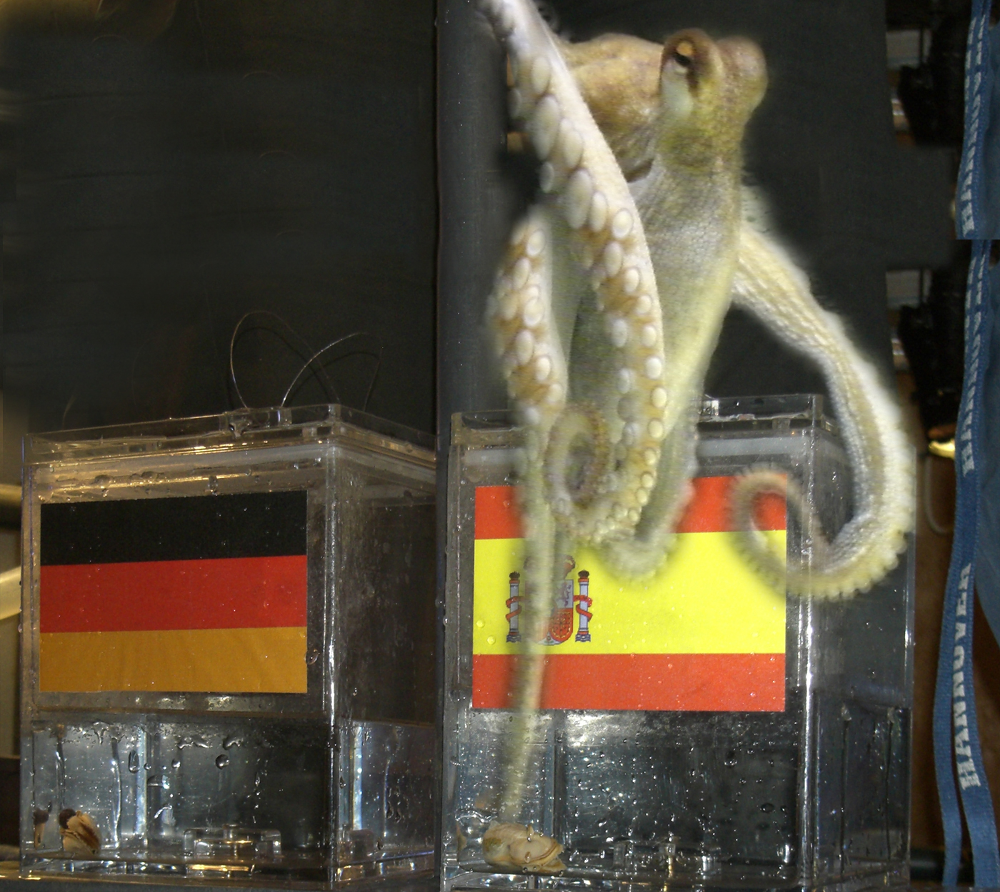 WM-Behälter des Oktopus-Orakels Paul.